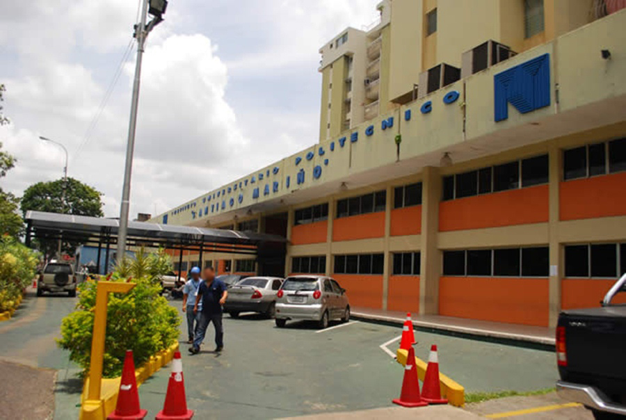 Sede Principal PSM Maturín Monagas